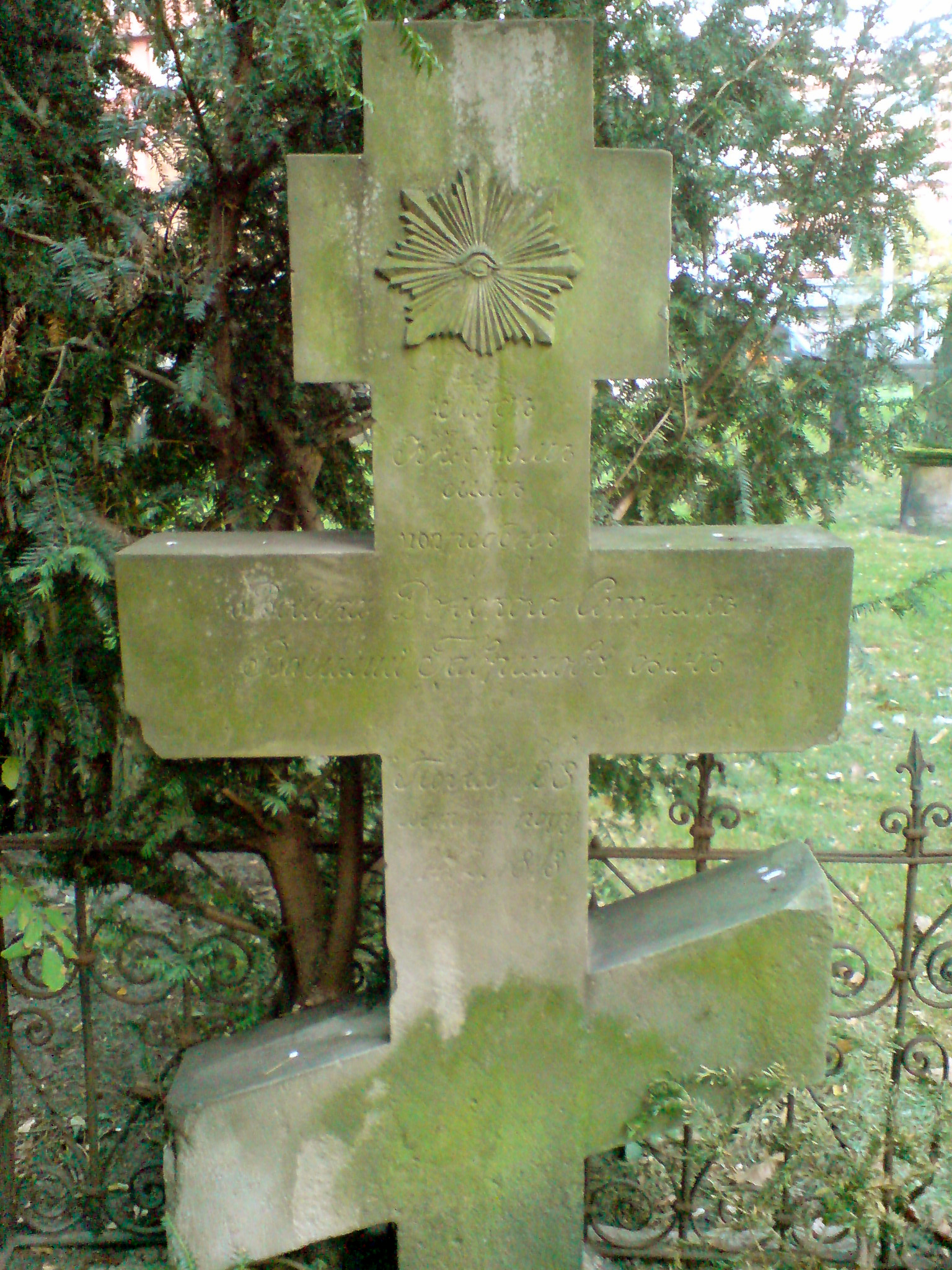 Inschrift in altrussischer (genauer: zarististischer) Schreibweise über den Tod von Gawriliy, Sohn des Gawriil (Gawriil, Gavriil) auf dem (russisch-)orthodoxem Kreuz. Ganz oben ein Stern als Auszeichnung/Abzeichen als russischer Offizier. Die schlechte Fotoqualität bitte ich höflich zu entschuldigen. Hier ging es heute weniger um Ästhetik, sondern um Schnelligkeit, um einen Kenner der altrussischen Schreibweise, die 1918 in die neurussische geändert wurde, zusagegemäß zur Übersetzung ins Russische einzuladen.